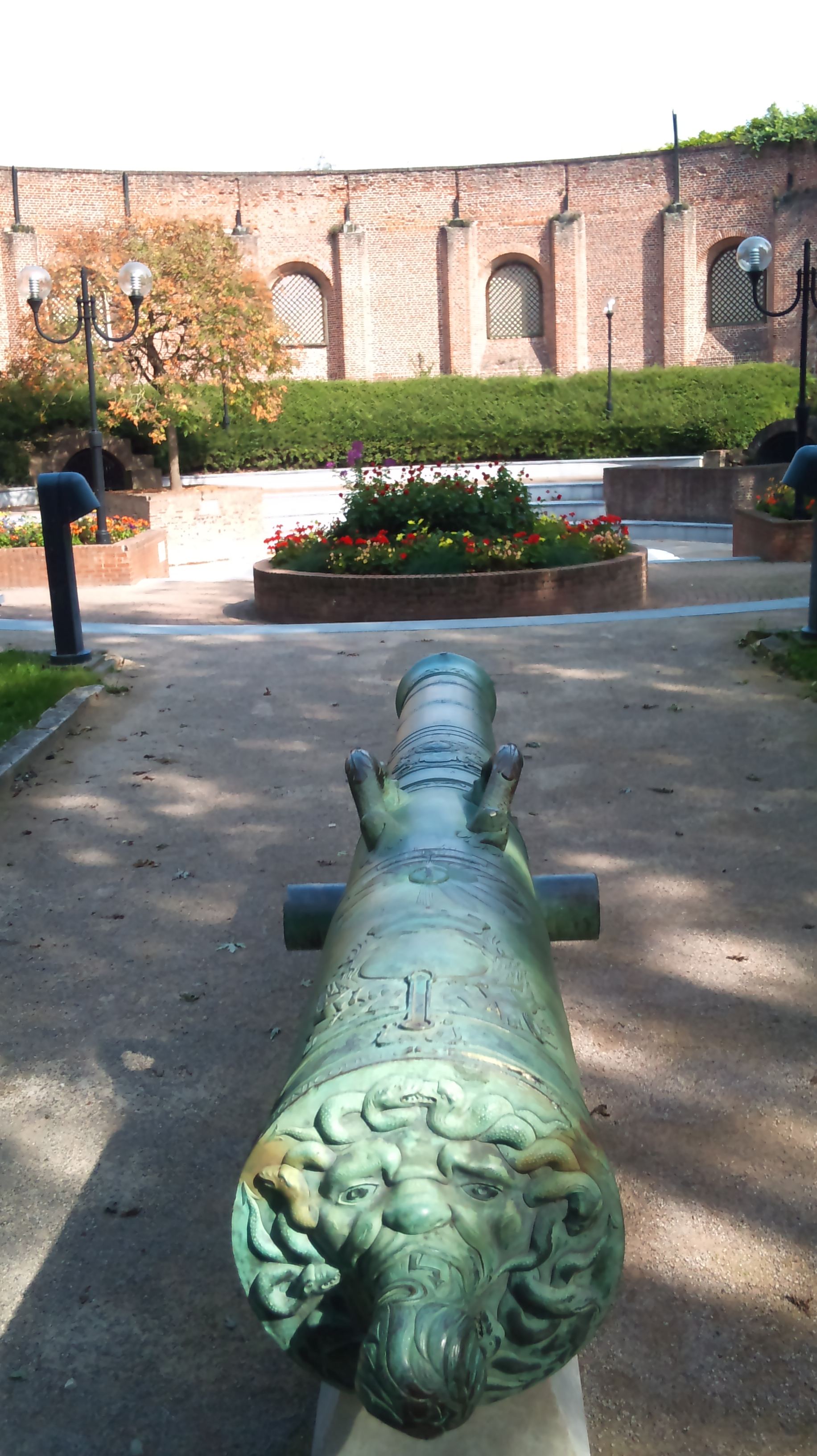 Douai - la fonderie de canons - la furibonde et enceinte